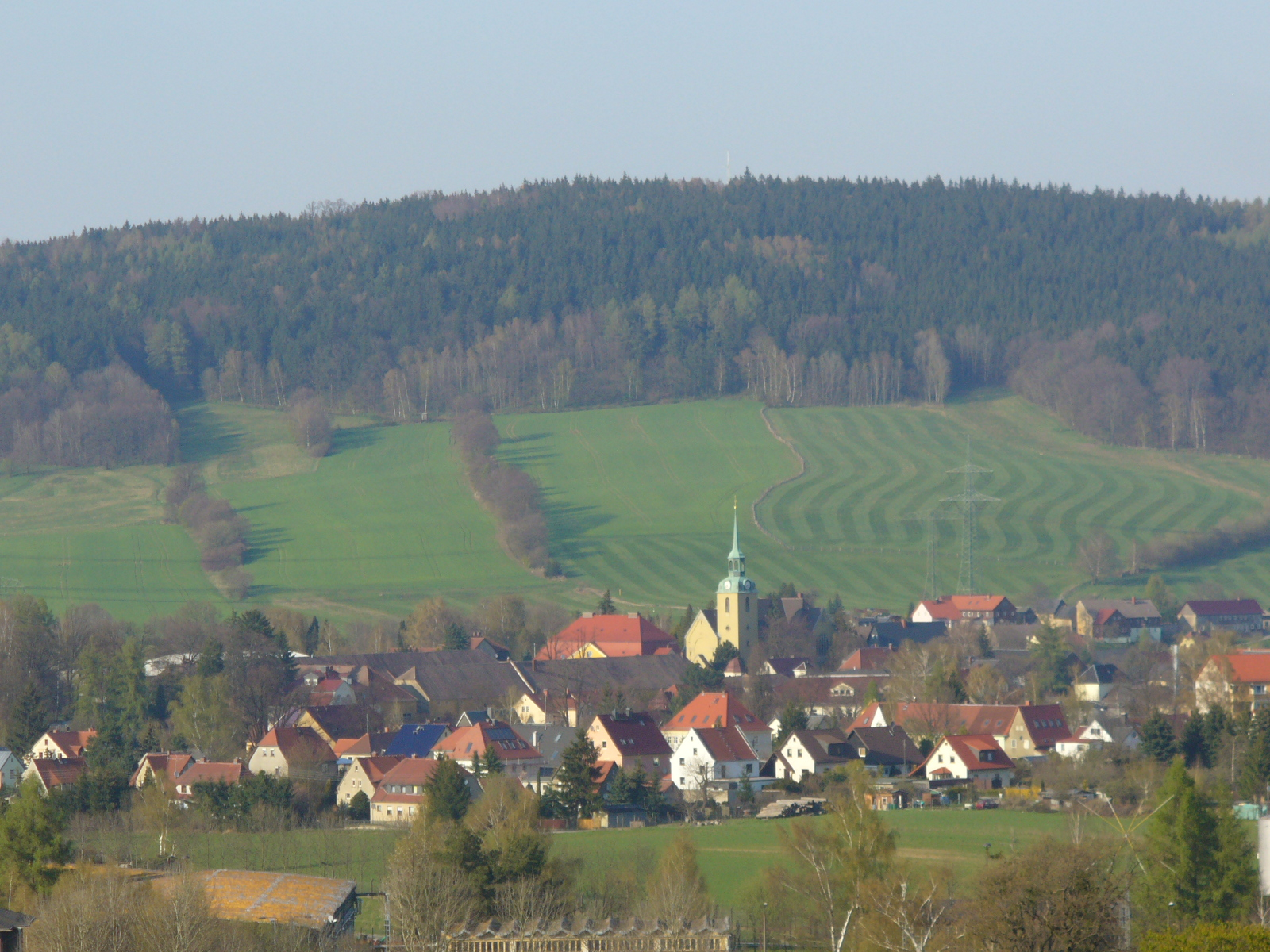 Wilthen. Blick aus Richtung Süd